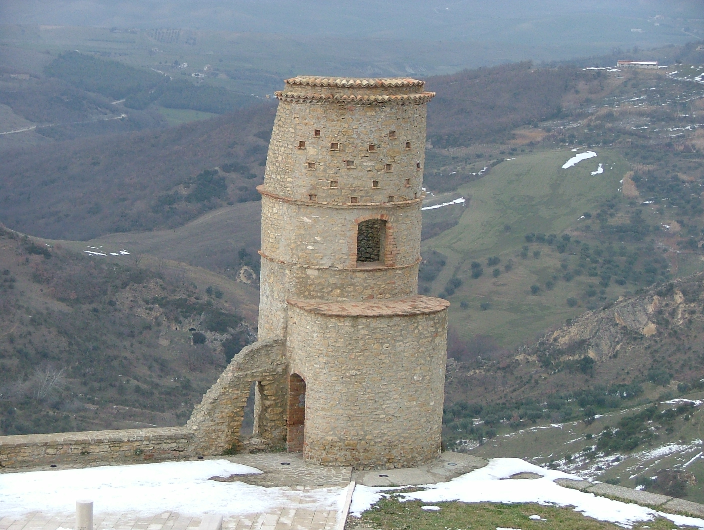 Autore Rocco STASI Fatta da me Torre saracena (sec. x), realizzata dagli arabi, con tutta la fortificazione di cui faceva parte, nella estremitÃ nord dell'abitato a margine di un pianoro dal quale si domina la valle del torrente Milo. GFDL